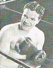 Carte de visite de Billy Soose des années 1940